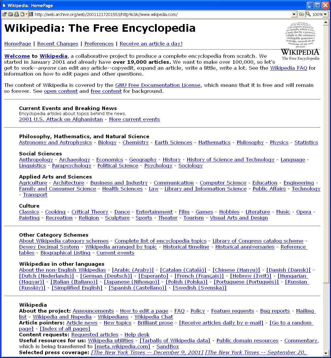 Screenshot der englischen Wikipedia Hauptseite über